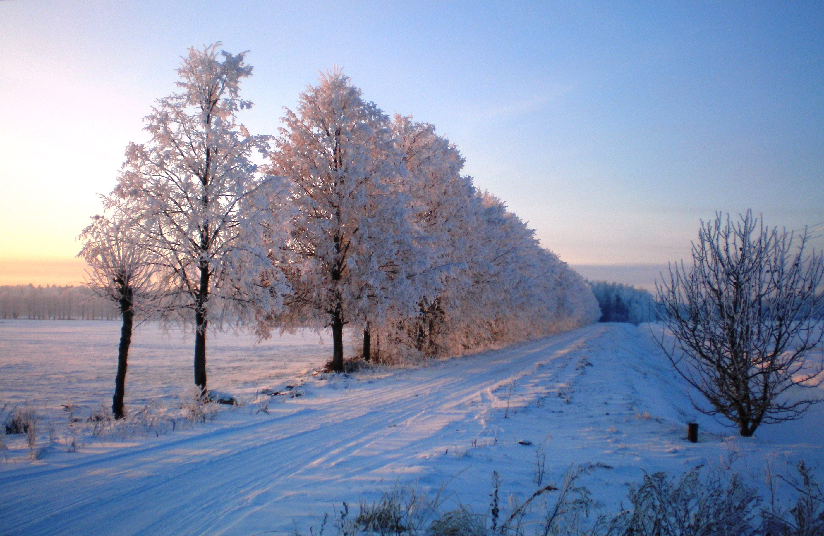 Alėja į Ąžuolotą, Kėdainių raj.